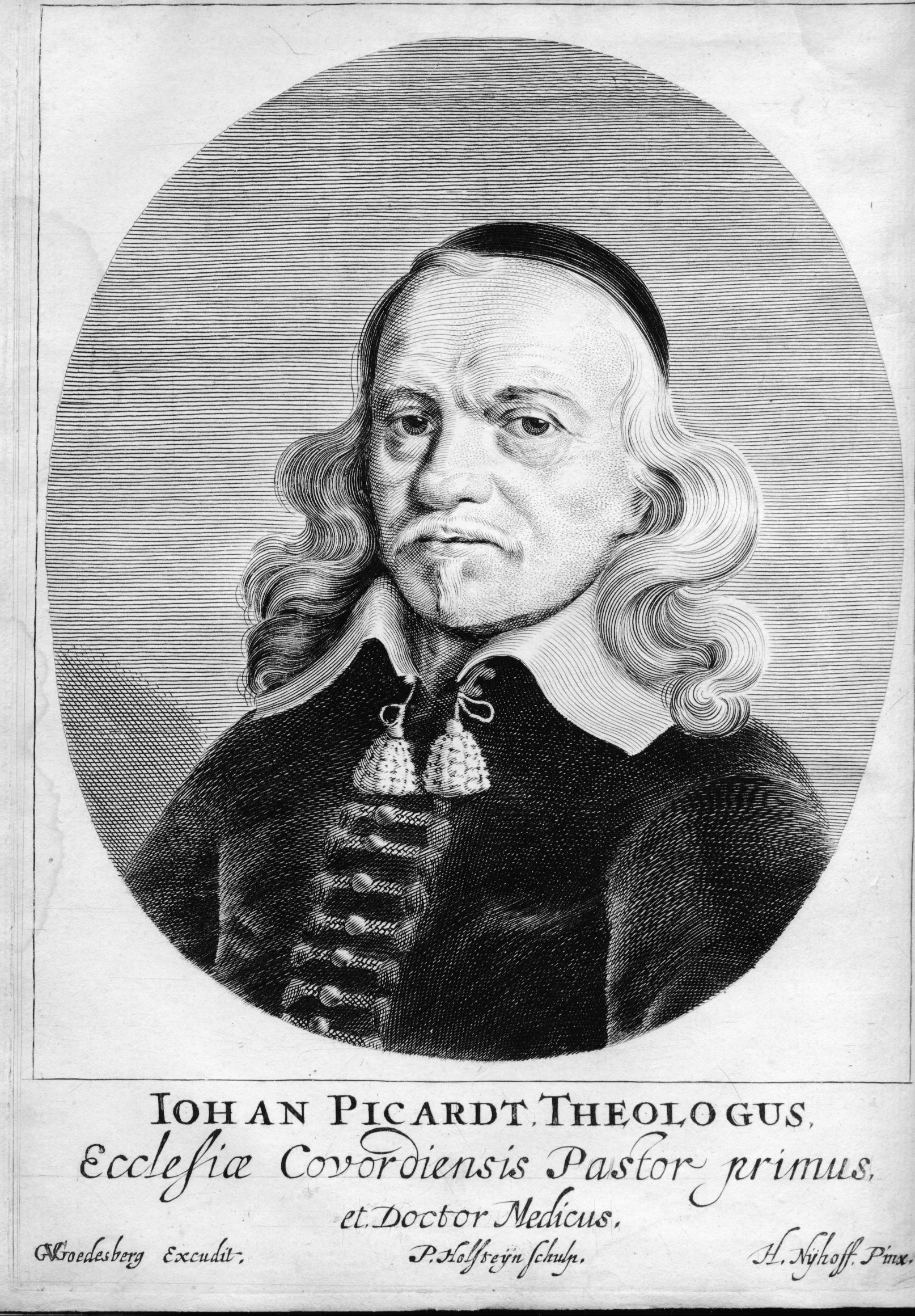 Portet Johan Picardt gravure uit 1660